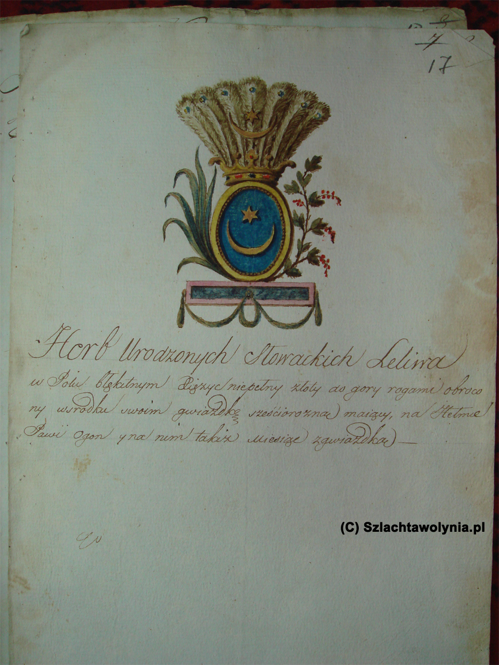 Herb urodzonych Słowackich Leliwa. Malunek podany przez rodzinę w trakcie legitymacji 1803 r. z opisaniem herbu. Kart – 1 pisana w języku polskim. Źródło: Centralne Państwowe Archiwum Historyczne Ukrainy w Kijowie. Zespół F782, inwentarz 1, nr 10957, karta 17.